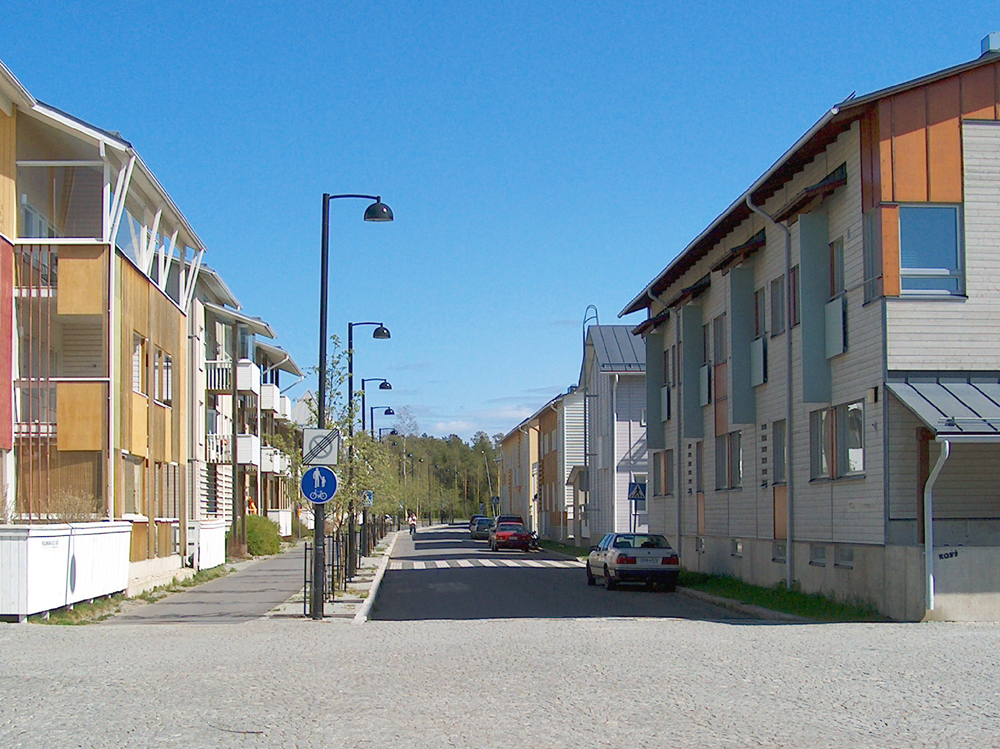 Puulinnanmaa, Oulu, Finland